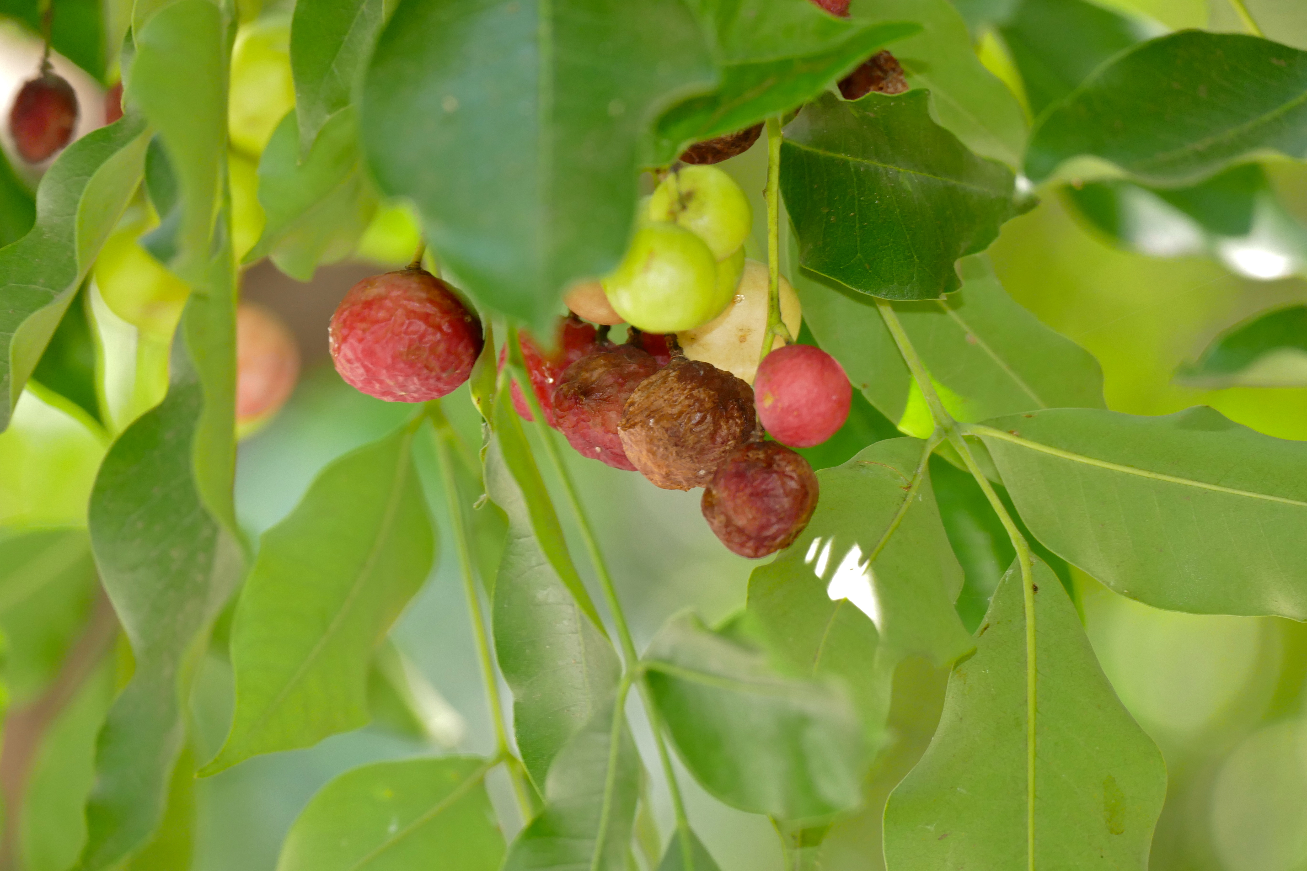 Timbavati, Kruger NP, SOUTH AFRICA